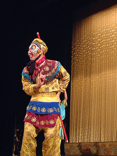 Српски (ћирилица): Приказ Сун Вуконга у пекиншкој опери